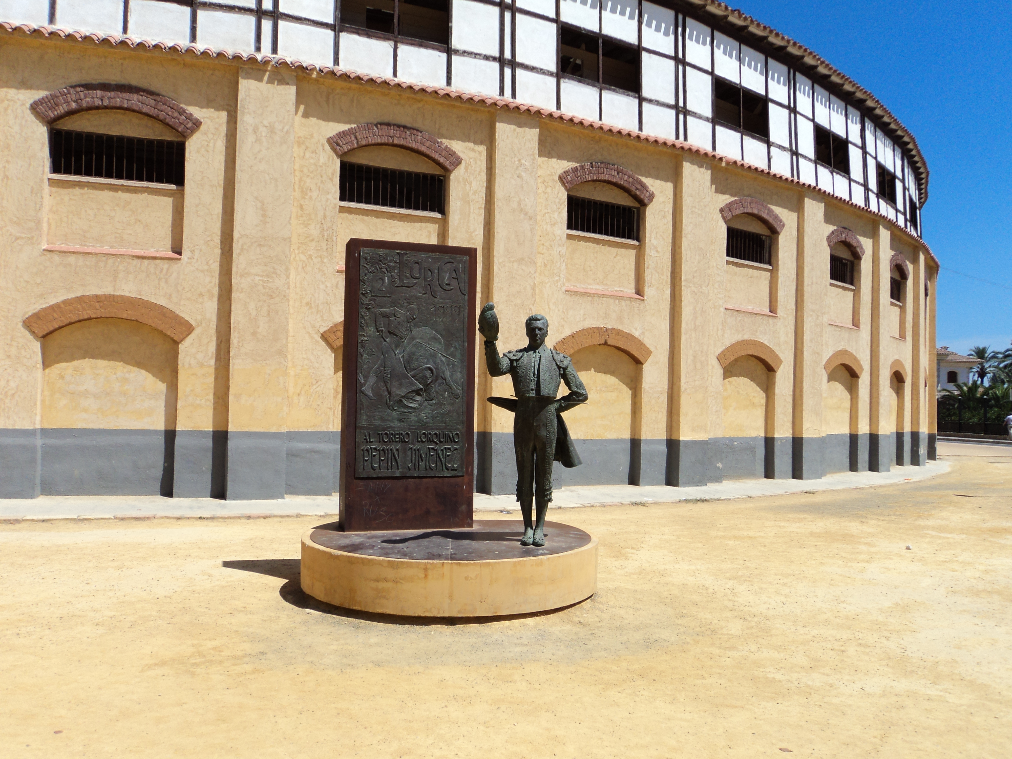 Arena de Touradas de Lorca